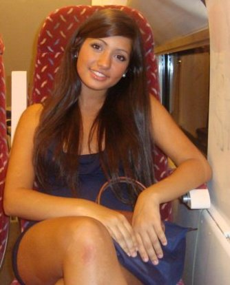 Antonella Di Monte, attrice